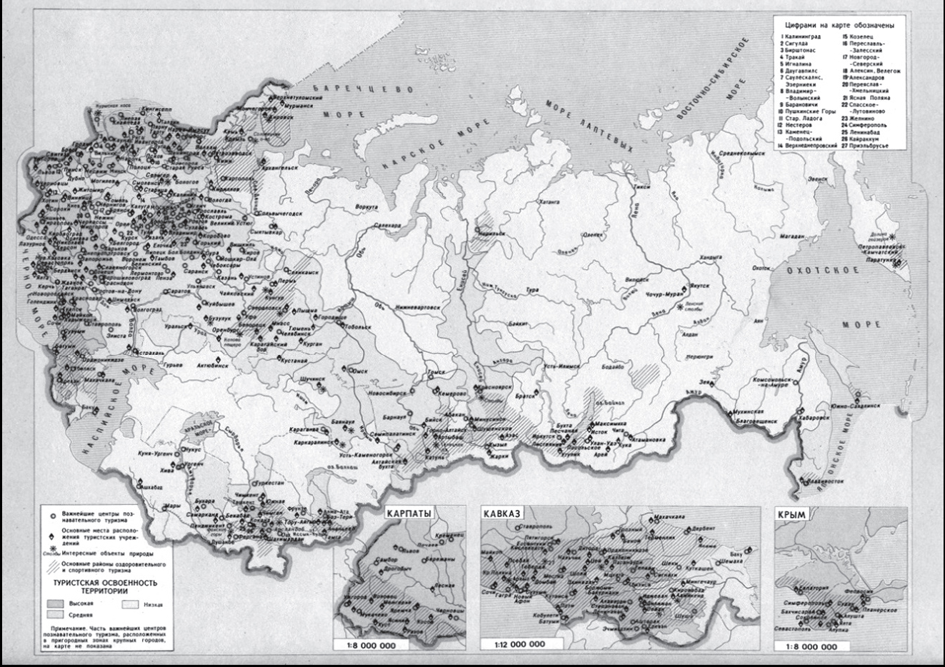 Настенная карта «Туризм и экскурсии в СССР» Всесоюзной научно-исследовательской лаборатории по туризму и экскурсиям (ВНИЛТЭ) Центрального совета по туризму и экскурсиям ВЦСПС